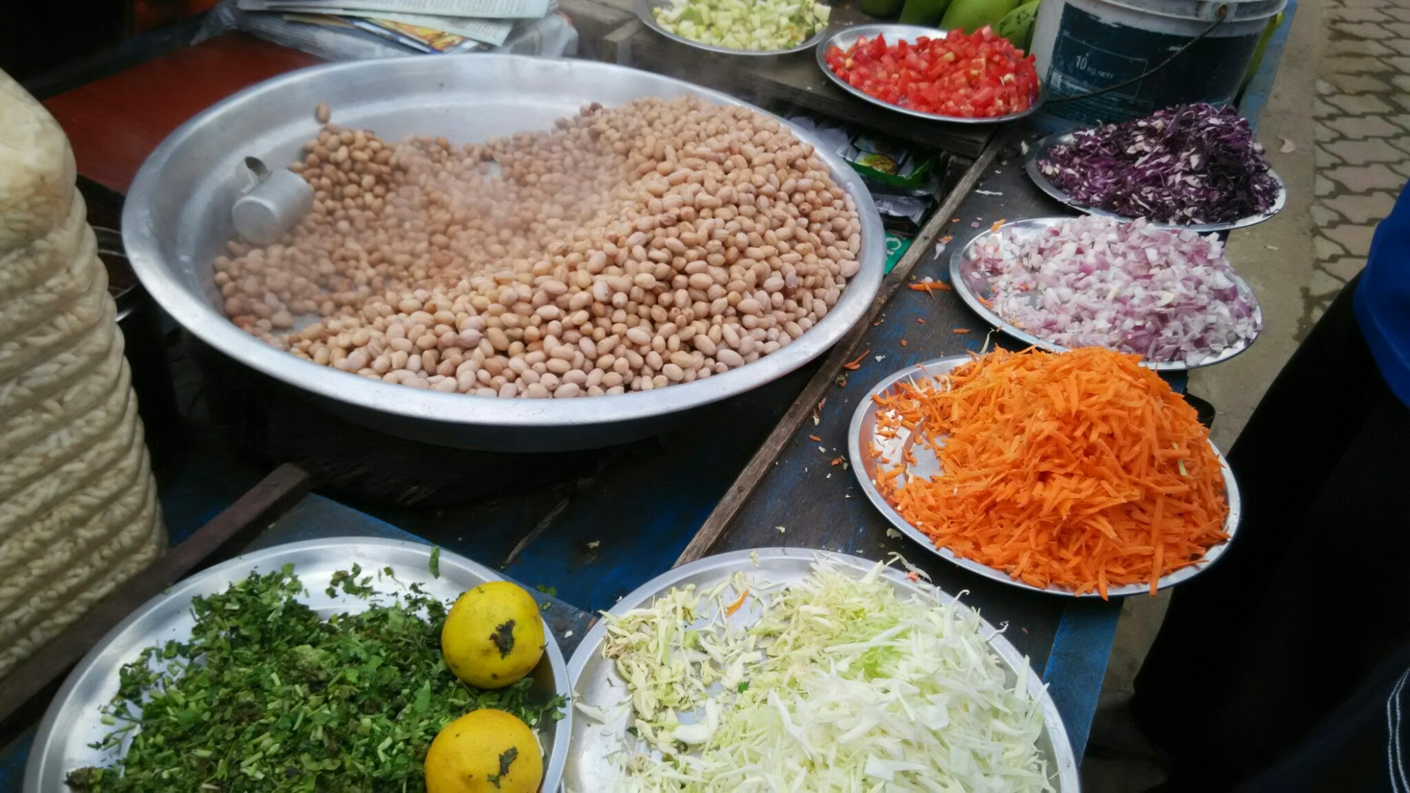 கொடைக்கானல் ஏரியைச்சுற்றி உள்ள வீதீயோரக்கடைகளில் விற்கப்படும் உணவு.